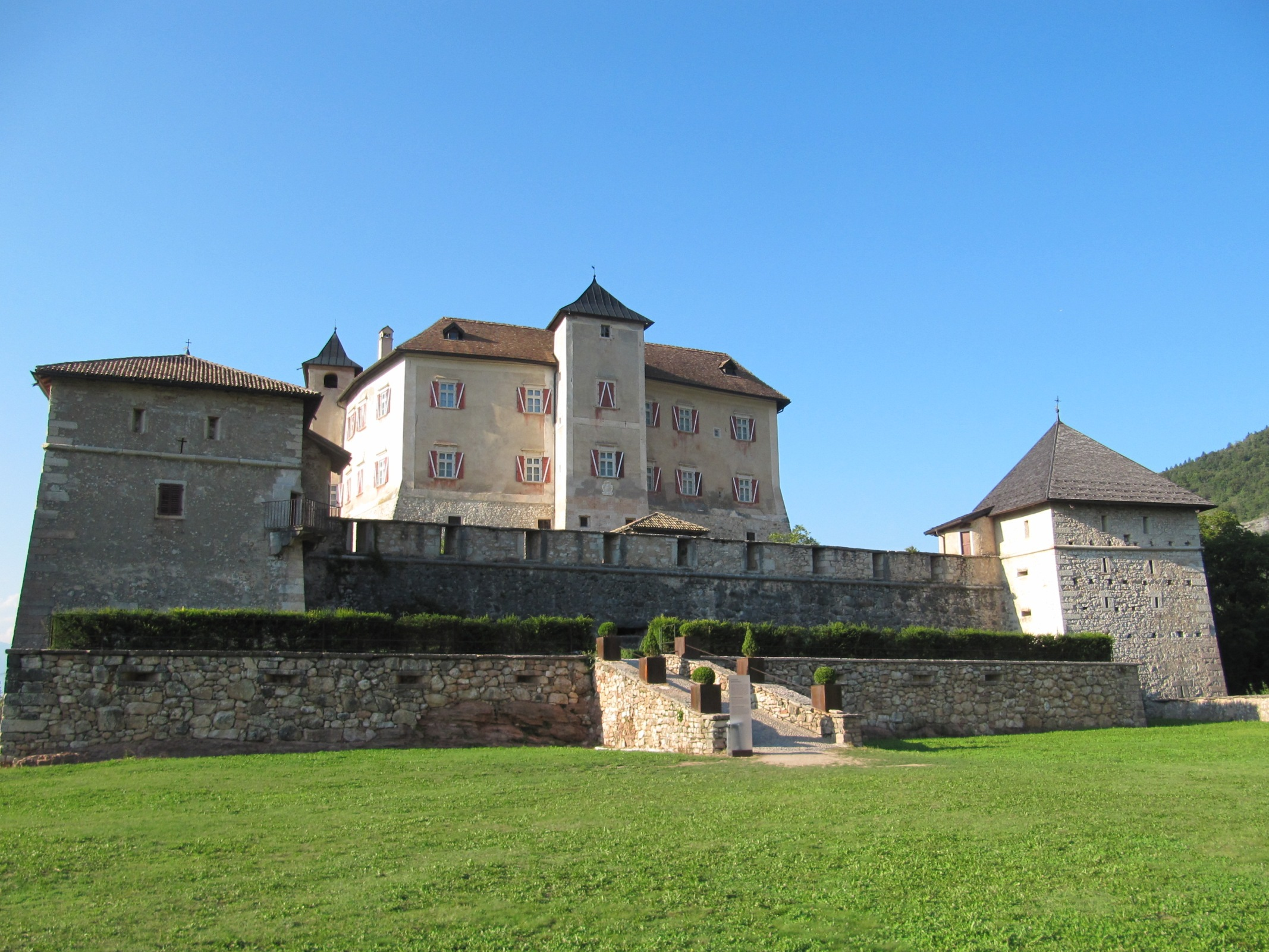 Castel Thun visto dal Campo dei tornei